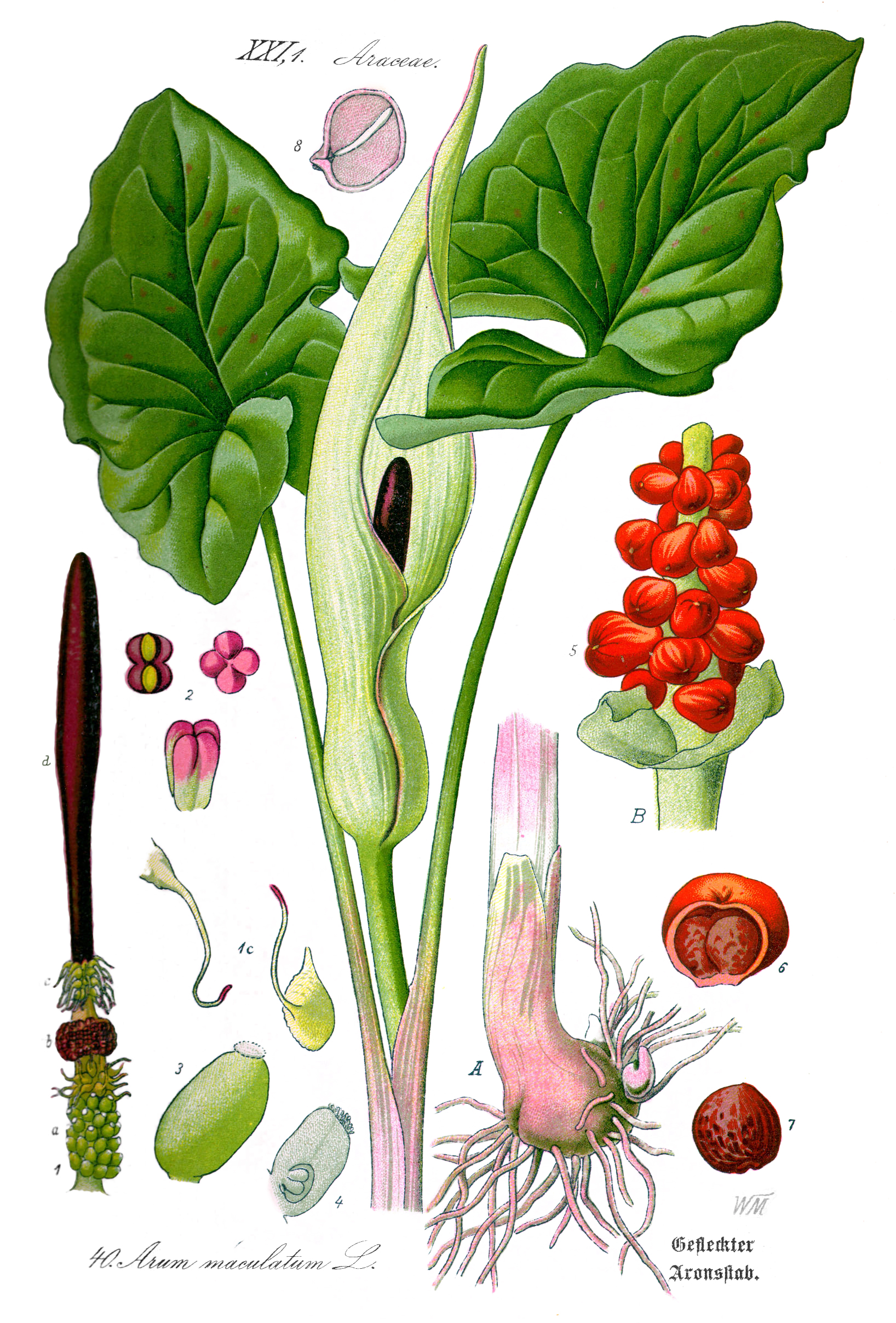 Name Arum maculatum Family Araceae